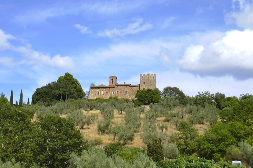 Badia di Sant Arcangelo